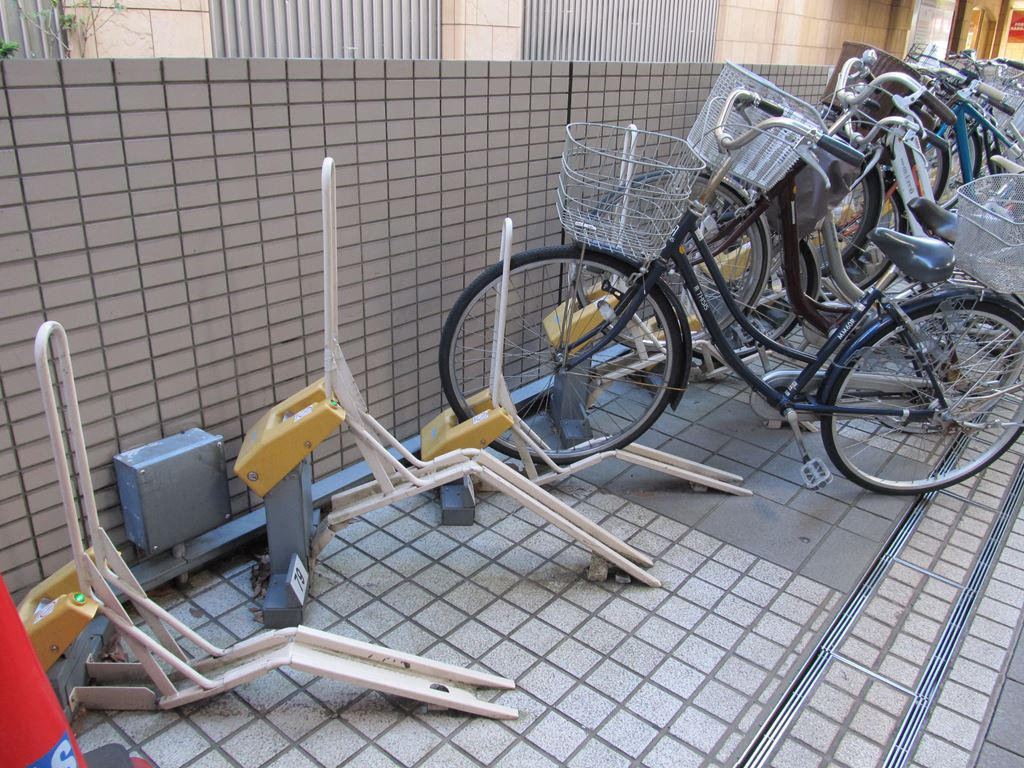 自転車用駐輪場ラック